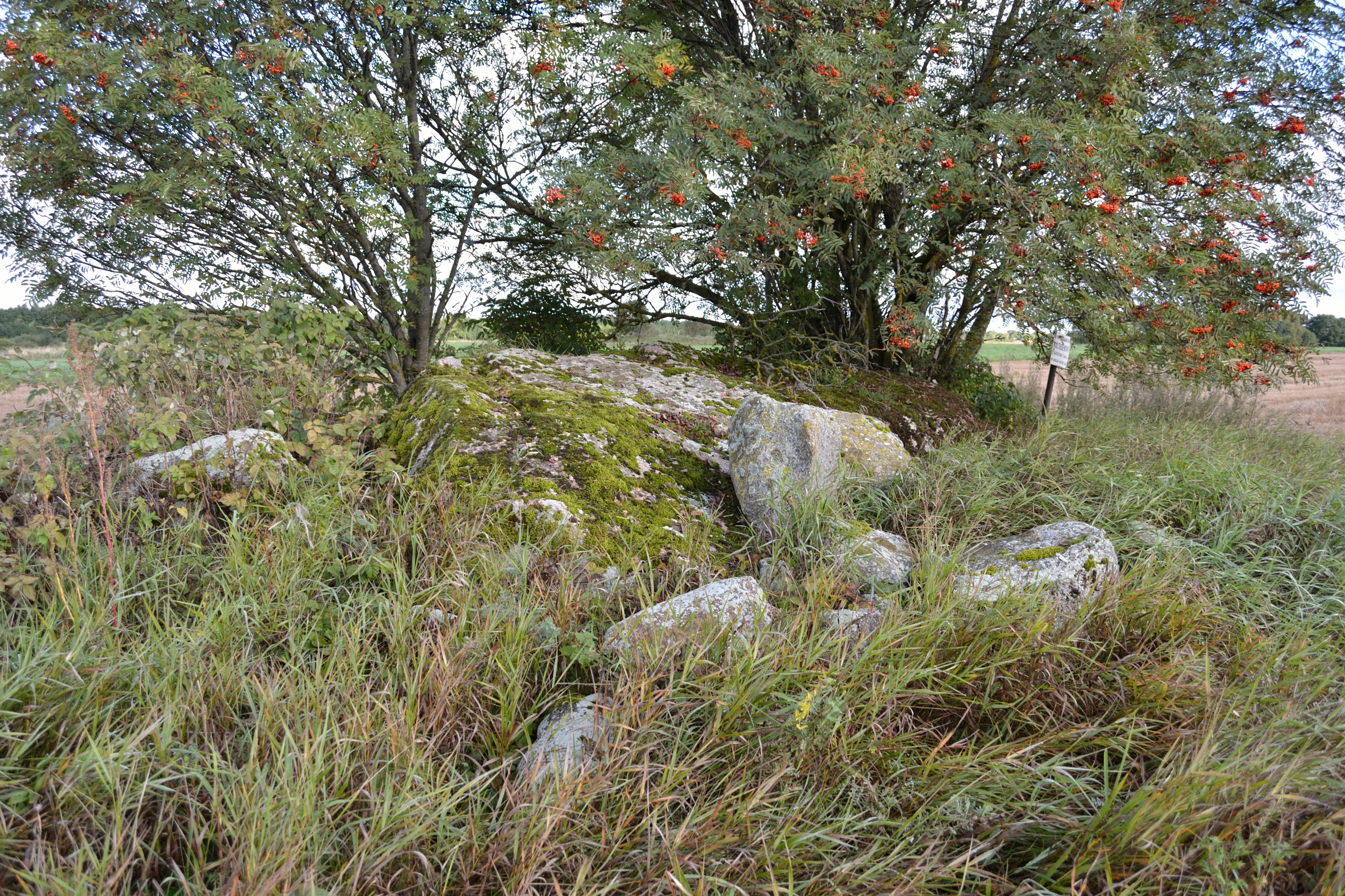 Kultusekivi, Saue vald, Alliku küla Suurekivi 1